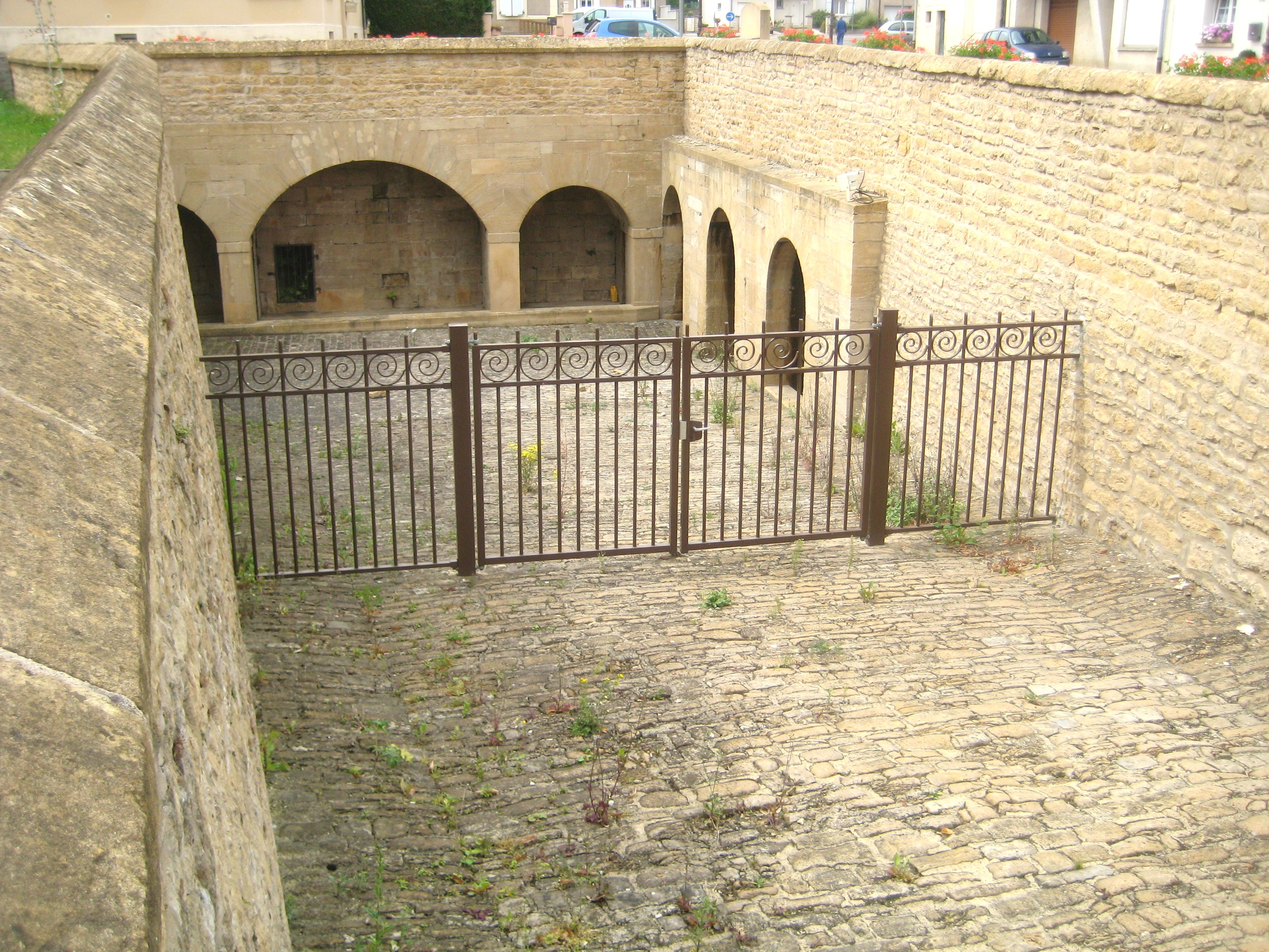 Description fontaine de Bure Date3 August 2011SourceAimelaimeAuthormoi-même fontaine de Bure